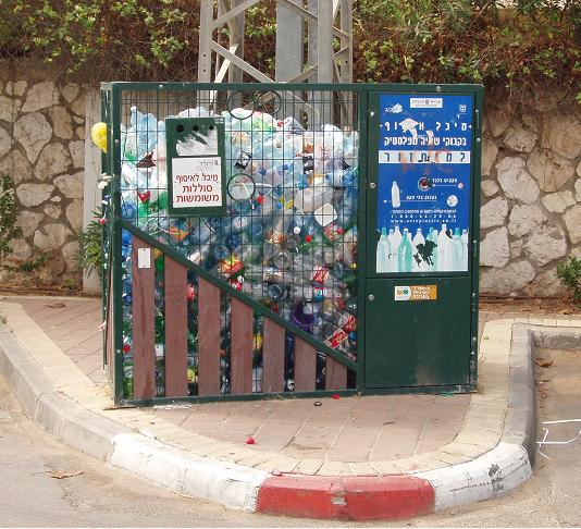 מתקן לאיסוף בקבוקי שתייה מפלסטיק, לשם מחזורם. צילם דוד שי